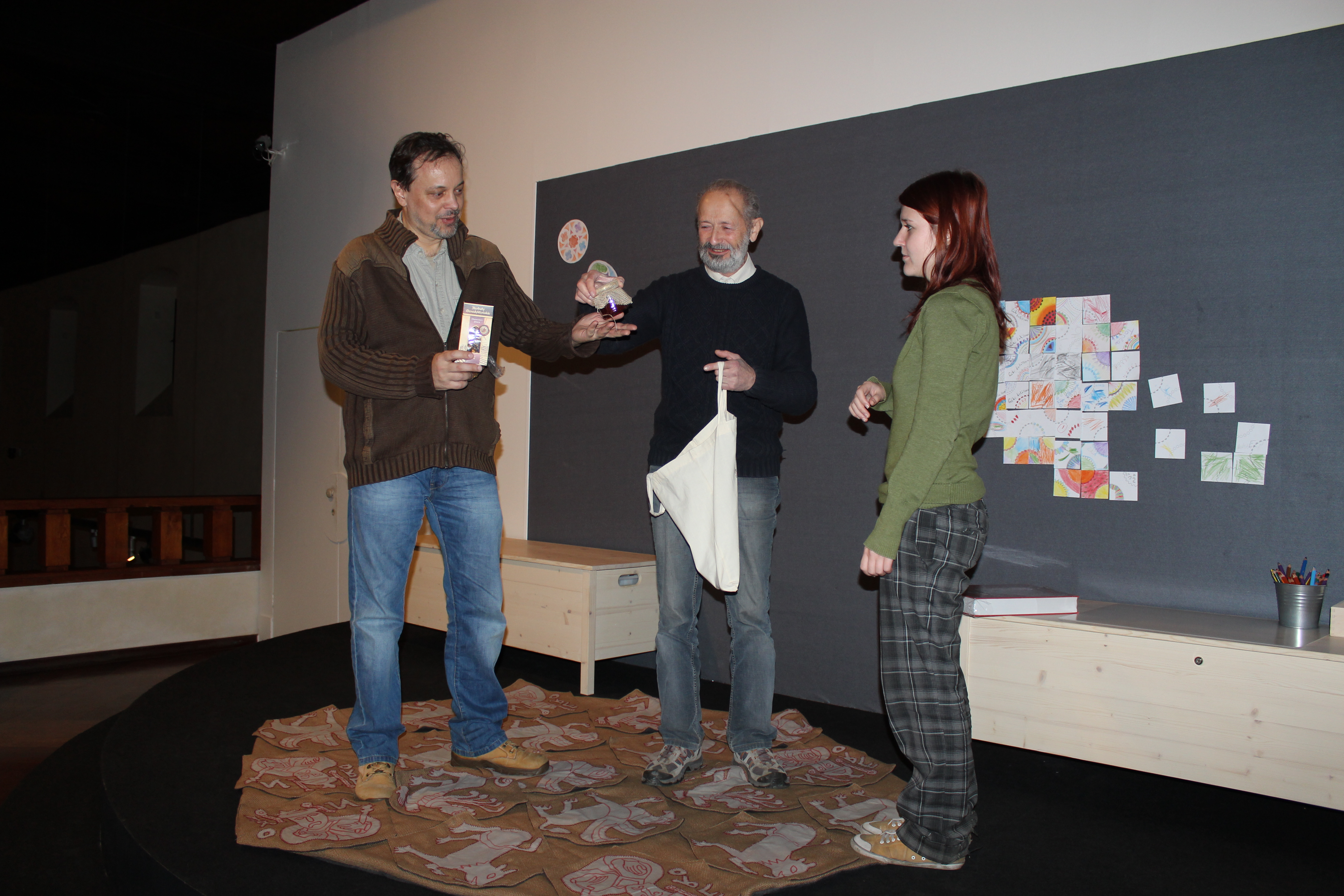 11. 12. 2014, Praha, Valdštejnská jízdárna RNDr. Jan Maňák se v letošním roce přihlásil do mezinárodní fotografické soutěže VIA BENEDICTINA pořádané benediktiským řádem K účasti v soutěži jej vyzval Mgr. Dušan Foltýn jeden z organizátorů a přední český monasteriolog (Centrem medievistických studií Akademie věd ČR). Se svou soutěžní sérií 10 snímků. Honza uspěl a jeho pohled a klášter ve Sv. Janu pod Skalou získal ocenění ve své kategorii. Mgr. Foltýn mu ve čtvrtek 11.12.2014 předal ve Valdštejnské jízdárně v Praze věcné ceny od broumovského kláštera kláštera sv. Vojtěcha reprezentativní publikaci Broumovsko a sadu výrobků benediktinského kláštera v Krakově. Ceny spolu s Mgr. Foltýnem předávali i studentky pražské pedagogické fakulty. Honza Maňák zároveň prezentoval naučnou stezku Liteň a svého zaměstnavatele Atelier Svatopluk, o.p.s. Liteň Místo předání bylo zvoleno záměrně: ve Valdštejnské zahradě se koná výstava Mezinárodní výstavní projekt Otevři zahradu rajskou. Benediktini v srdci Evropy 800–1300 připravuje Národní galerie v Praze ve spolupráci s Katolickou teologickou fakultou Univerzity Karlovy v Praze a Centrem medievistických studií Akademie věd České republiky, za podpory Metropolitní kapituly u sv. Víta v Praze, Správy Pražského hradu, Národního muzea a Národní knihovny. Výstava se bude konat ve Valdštejnské jízdárně v Praze v termínu od 7. listopadu 2014 do 15. března 2015.